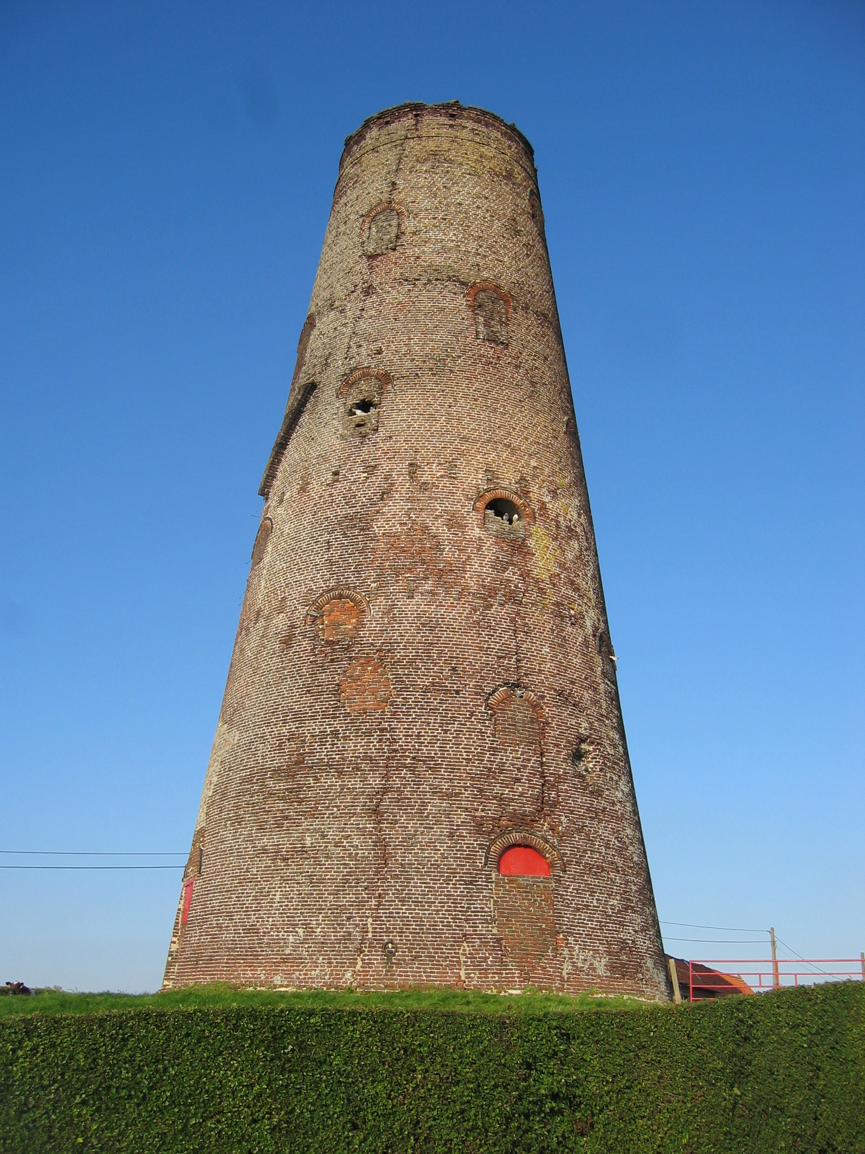 Doornmolen in Ingelmunster, Belgium. Picture by Tim Bekaert, August 2006. Eigenaar : Noël Bruggeman-Bogaert Bouwjaar : 1772 / 1817 / 1856 Type: stenen stellingmolen Functie : koren- en oliemolen Kenmerken: hoge romp Gevlucht/Rad : al verdwenen in 1883 Inrichting : al verdwenen in 1883